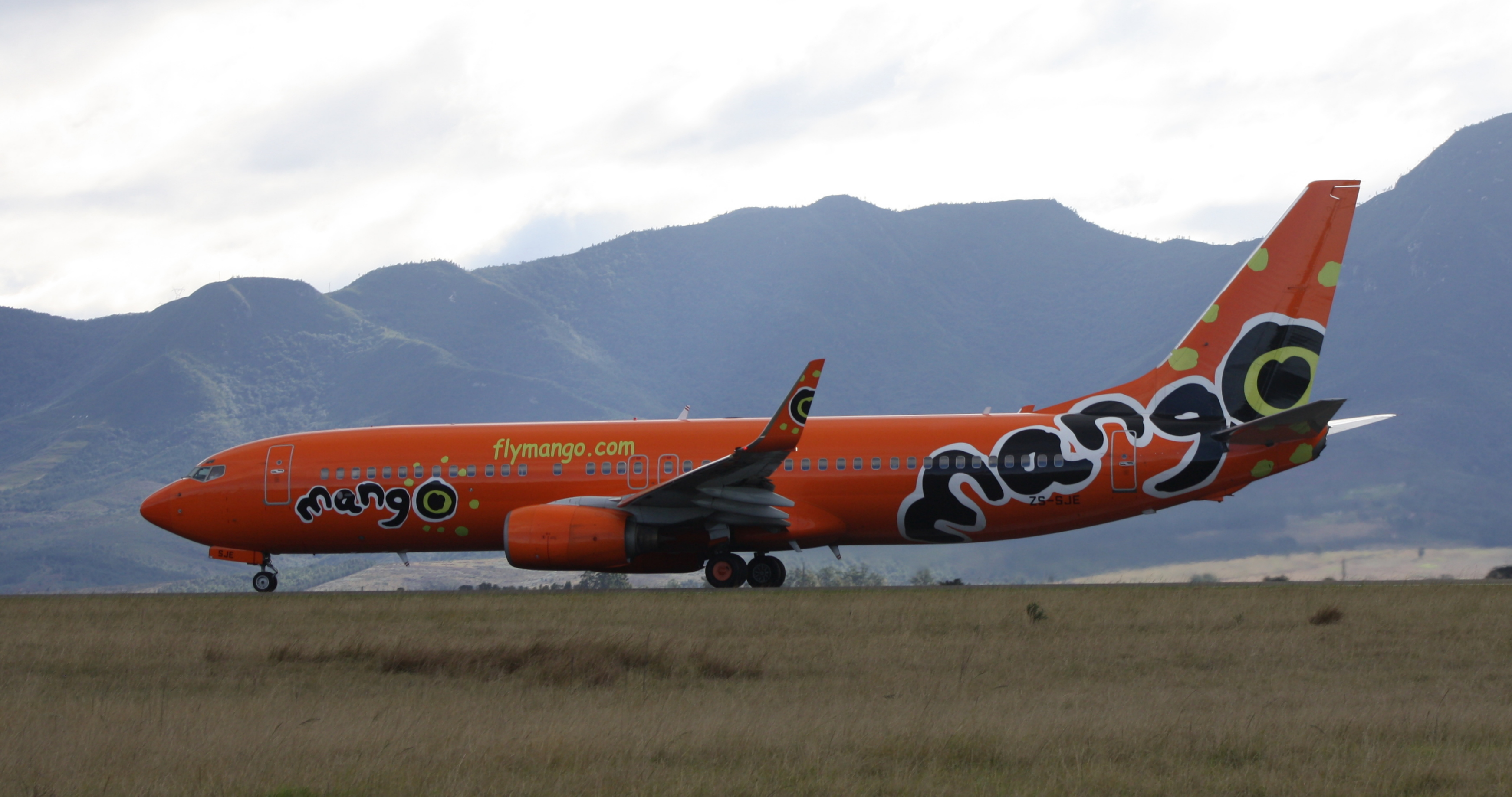 Mango B737-85F ZS-SJE